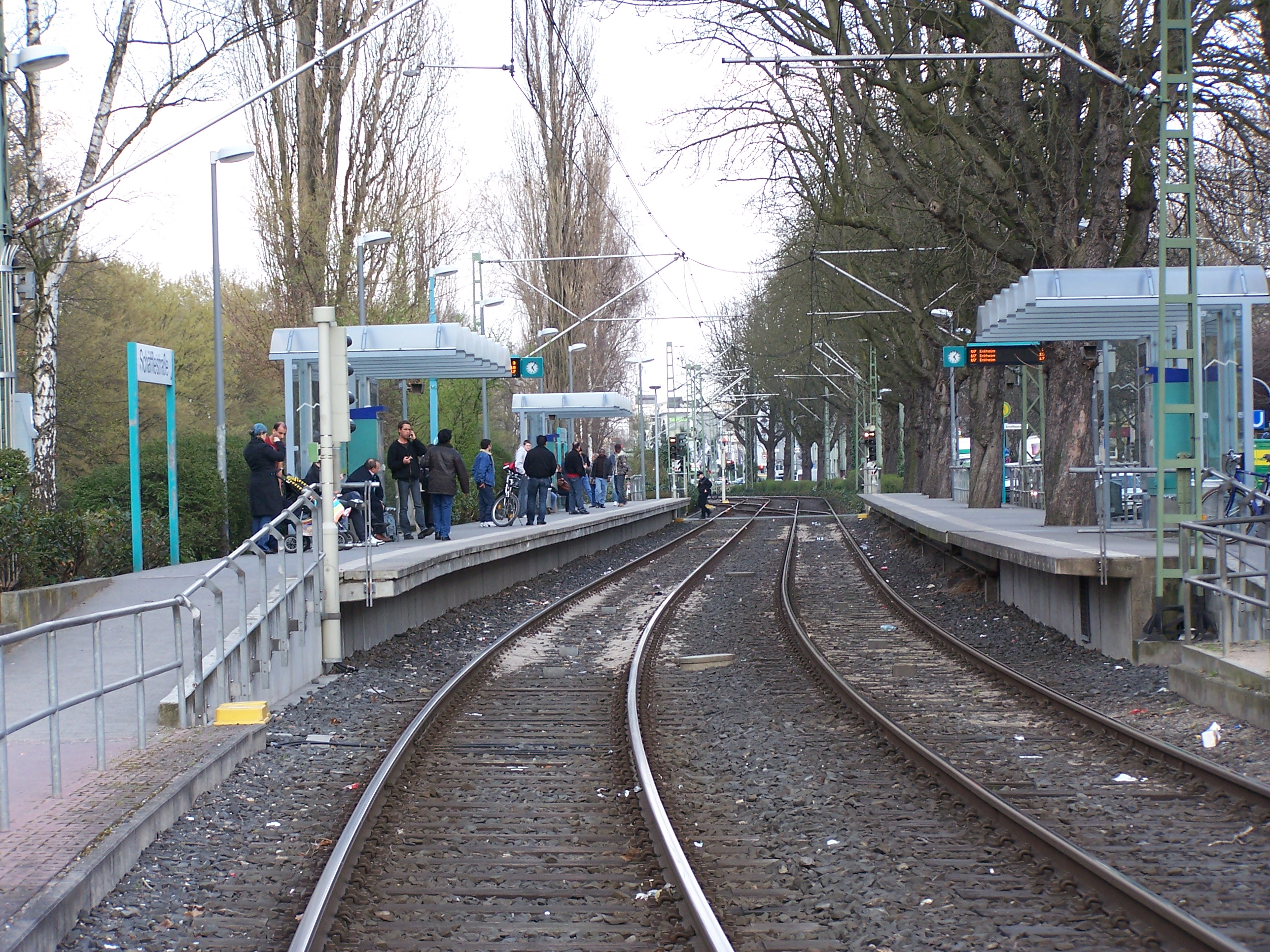 U-Bahnstation Schäfflestraße (C-Strecke, U7)